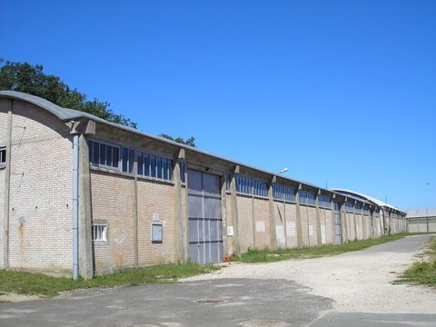 Gebäude des Stacheldrahtseminars in Chartres - Le Coudray, Frankreich, 2012 - heute Europäische Begegnungsstätte Franz Stock